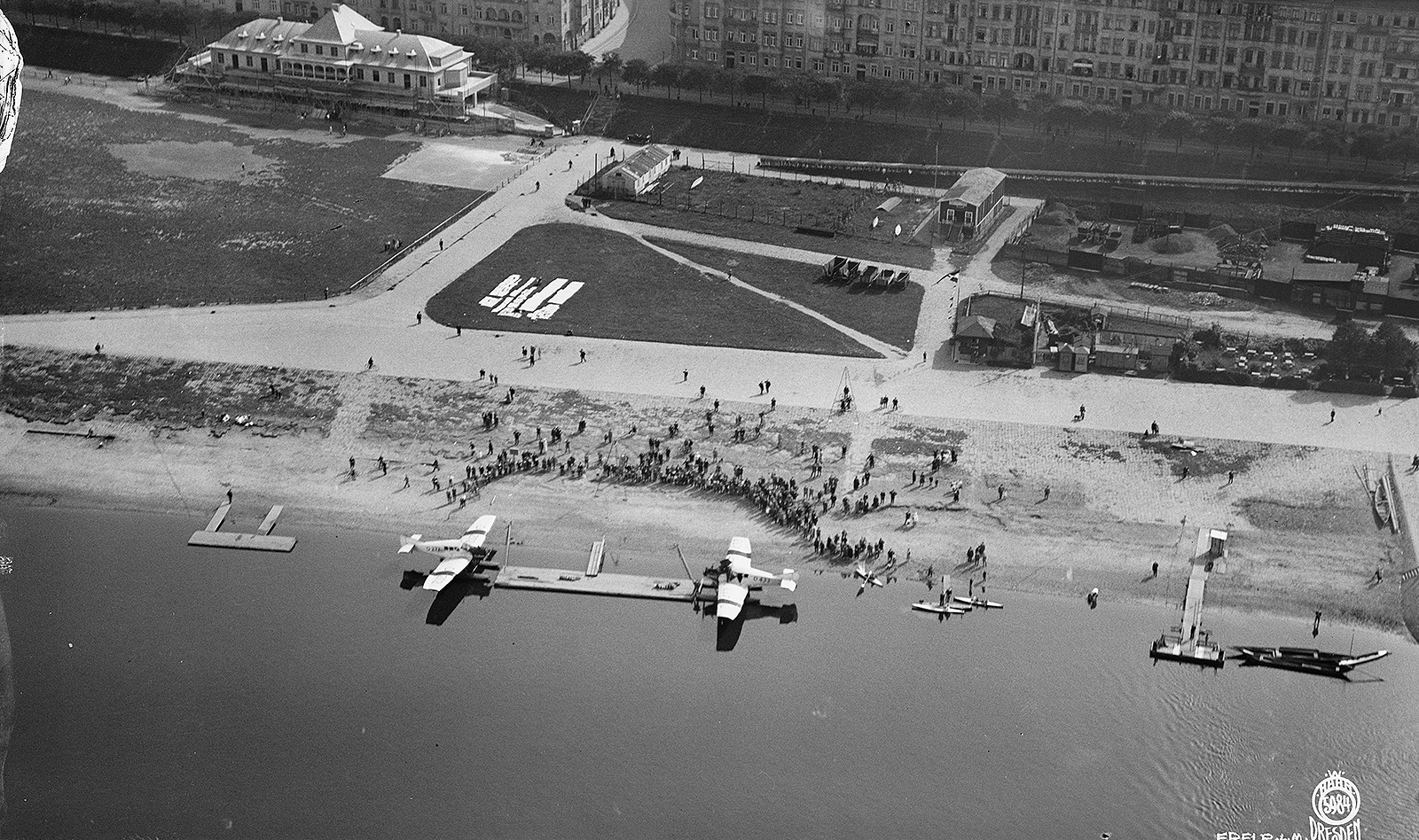 Original image description from the Deutsche FotothekDresden-Johannstadt. Wasserflugplatz an der Elbe, 1925